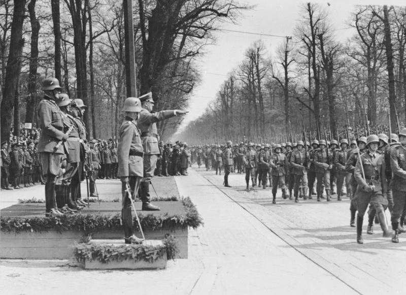 Berlin, Geburtstag Adolf Hitler, Parade ADN-ZB-Archiv Berlin 20.4.1936 Grosse Parade zum 47. Geburtstag des Führers. Hitler nimmt vor den Tribünen am Kleinen Stern, den Vorbeimarsch der Truppen ab. Hinter [Adolf] Hitler von links nach rechts: [Werner] von Blomberg, [Hermann] Göring, Dr. h.c. [Erich] Raeder und General [Gerd] von Rundstedt. 5226-36 [Scherl Bilderdienst] Abgebildete Personen: Blomberg, Werner von: Generalfeldmarschall, Heer, Deutschland Hitler, Adolf: Reichskanzler, Deutschland